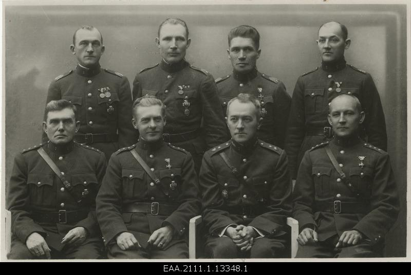 2. Üksiku Jalaväepataljoni kaitseväelased 1932. aastal. Esireas paremalt teine pataljoni ülem major Villem Saarsen.